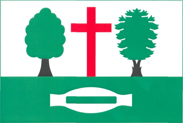 vlajka, Janov, okres Rychnov nad Kněžnou